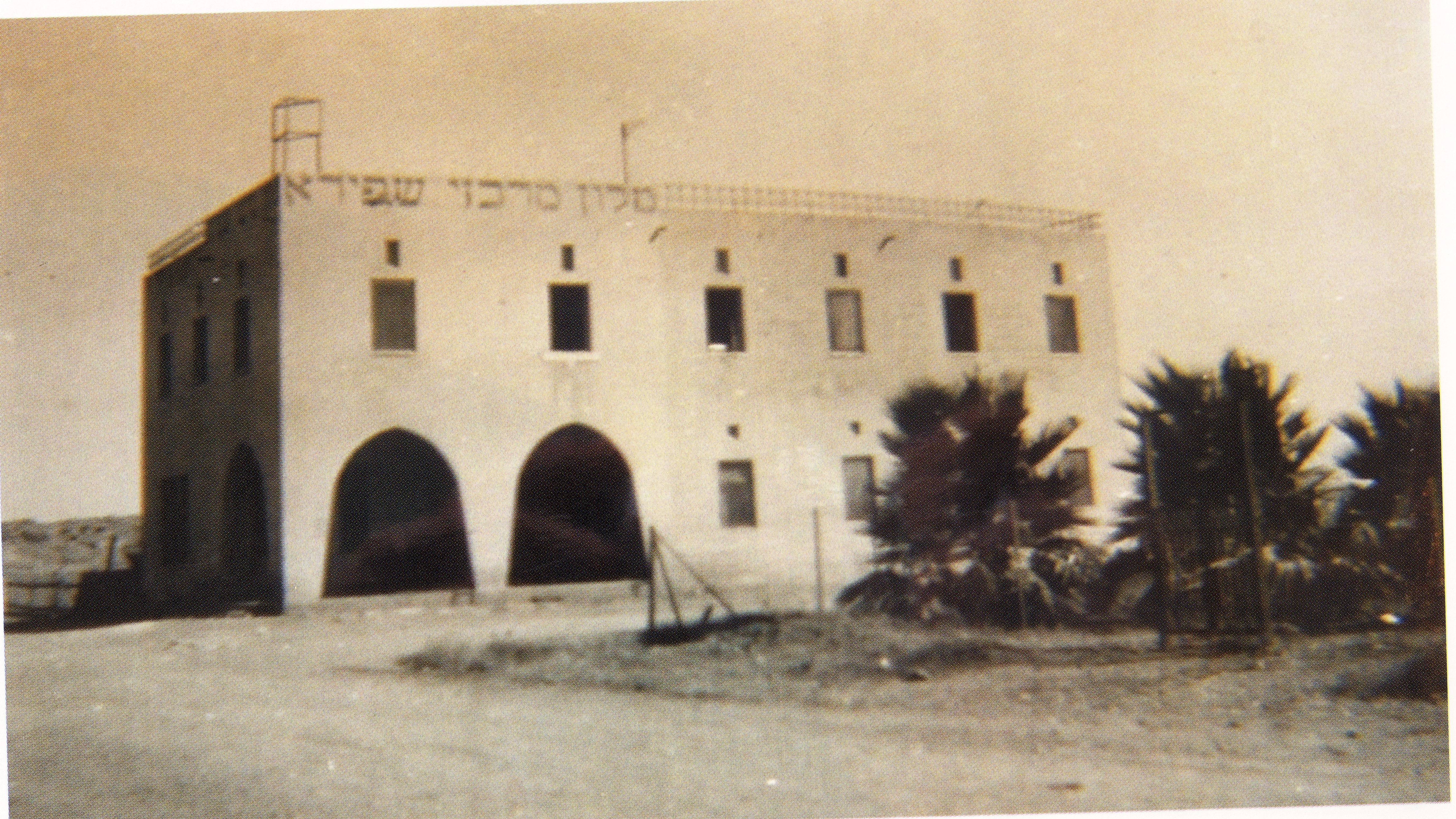 מלון מרכזי שפירא, עפולה